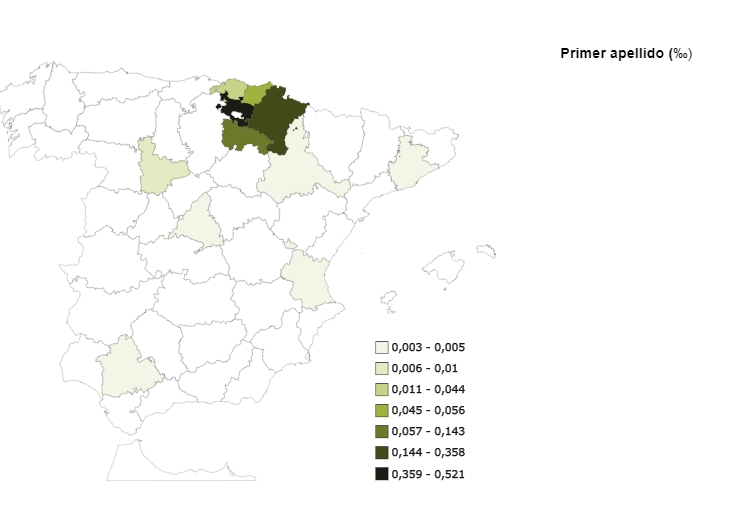 Repartición del apellido de Txasko o Chasco en la Península Ibérica.